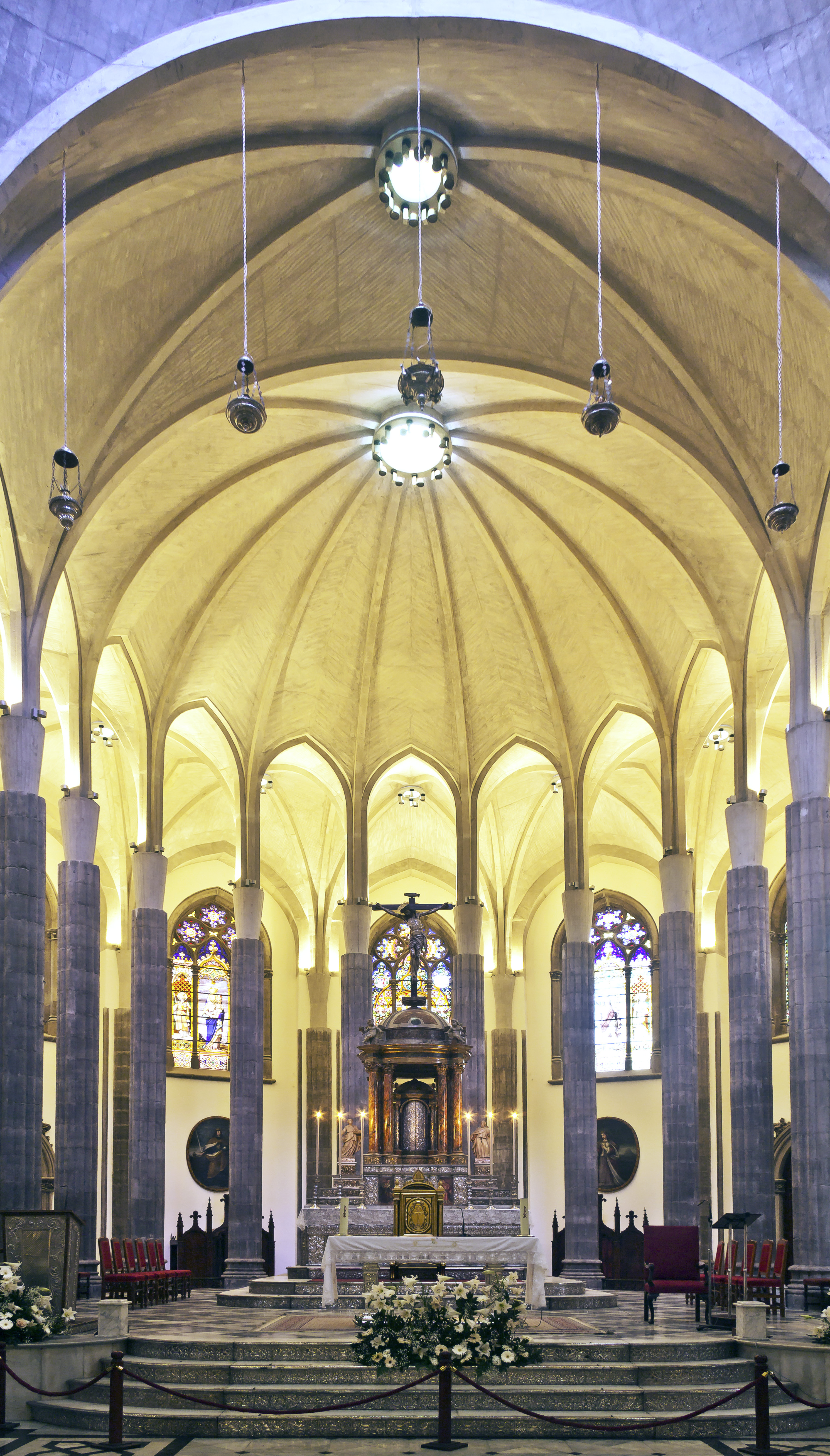 Hauptaltar der Kathedrale in La Laguna